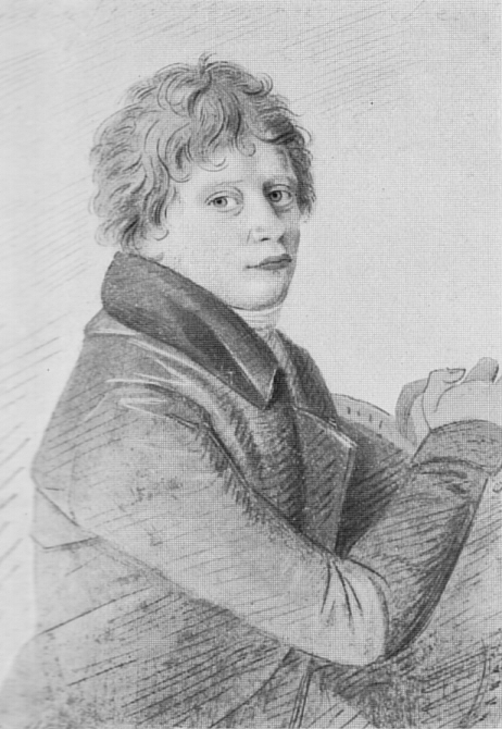 Ferdinand Jagemann Silberstiftzeichnung, Sammlung Kippenberg Leipzig (1932)